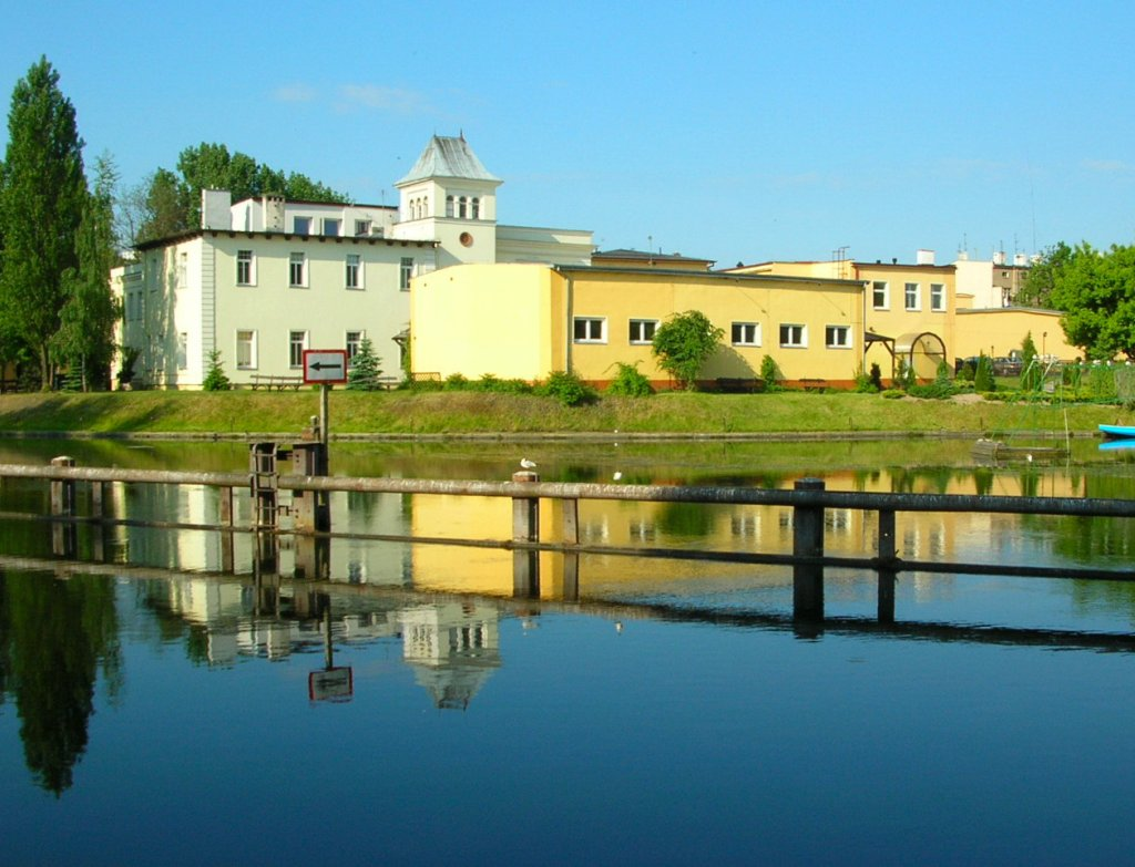 Dawna garbarnia Ludwiga Buchholza, budynek właściciela z 1862 r., ob. budynek należący do Wyższej Szkoły Gospodarki w Bydgoszczy